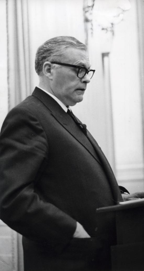 Minister van Binnenlandse Zaken Jan Smallenbroek (ARP) legt een verklaring af in de Tweede Kamer, naar aanleiding van de rellen in Amsterdam tijdens het huwelijk van Beatrix. Den Haag, 19 juli 1966.